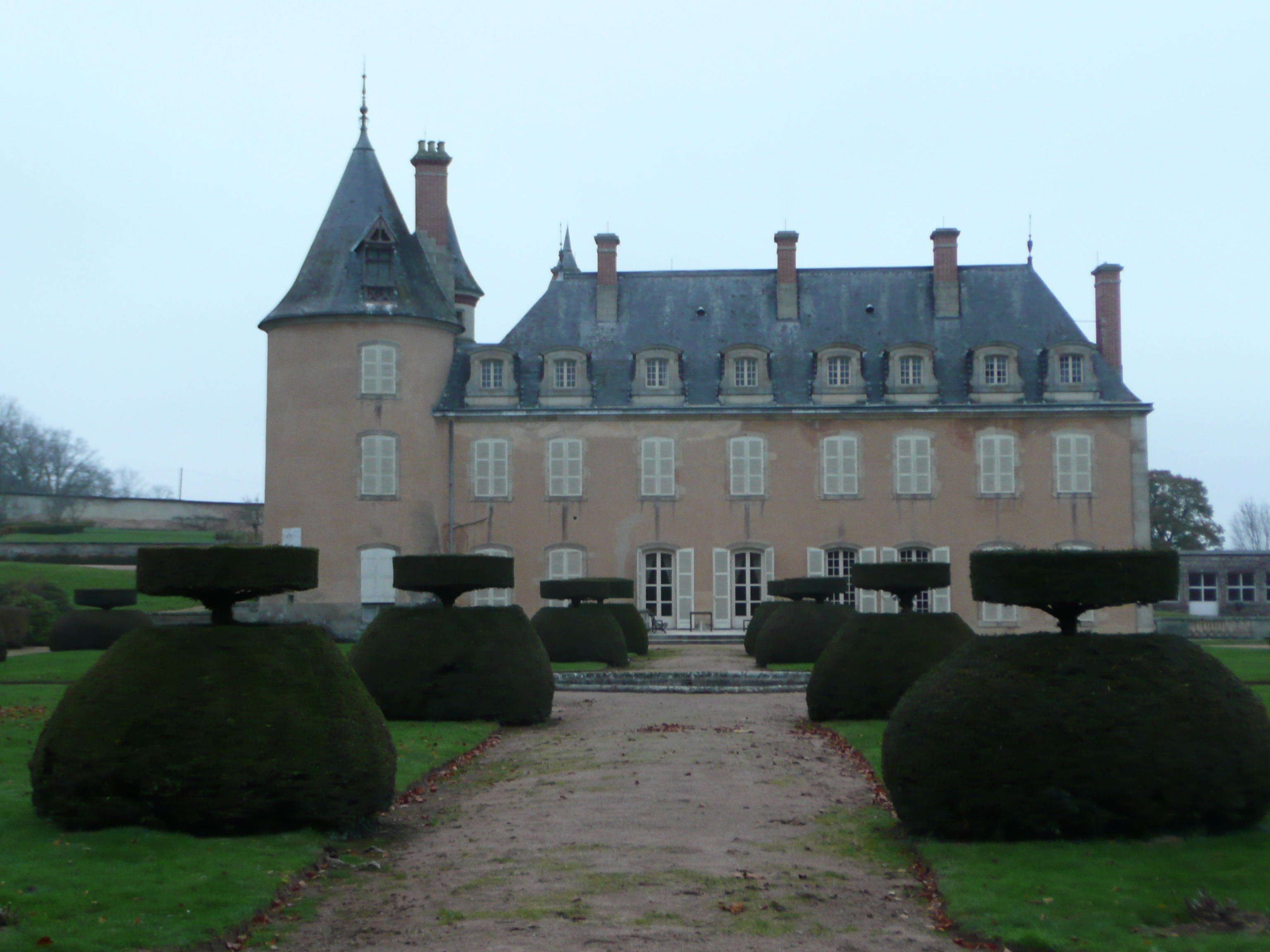 Château du Terreau (XIIIe, XIVe et XVIIIe siècles), à Verosvres (Saône-et-Loire, France)